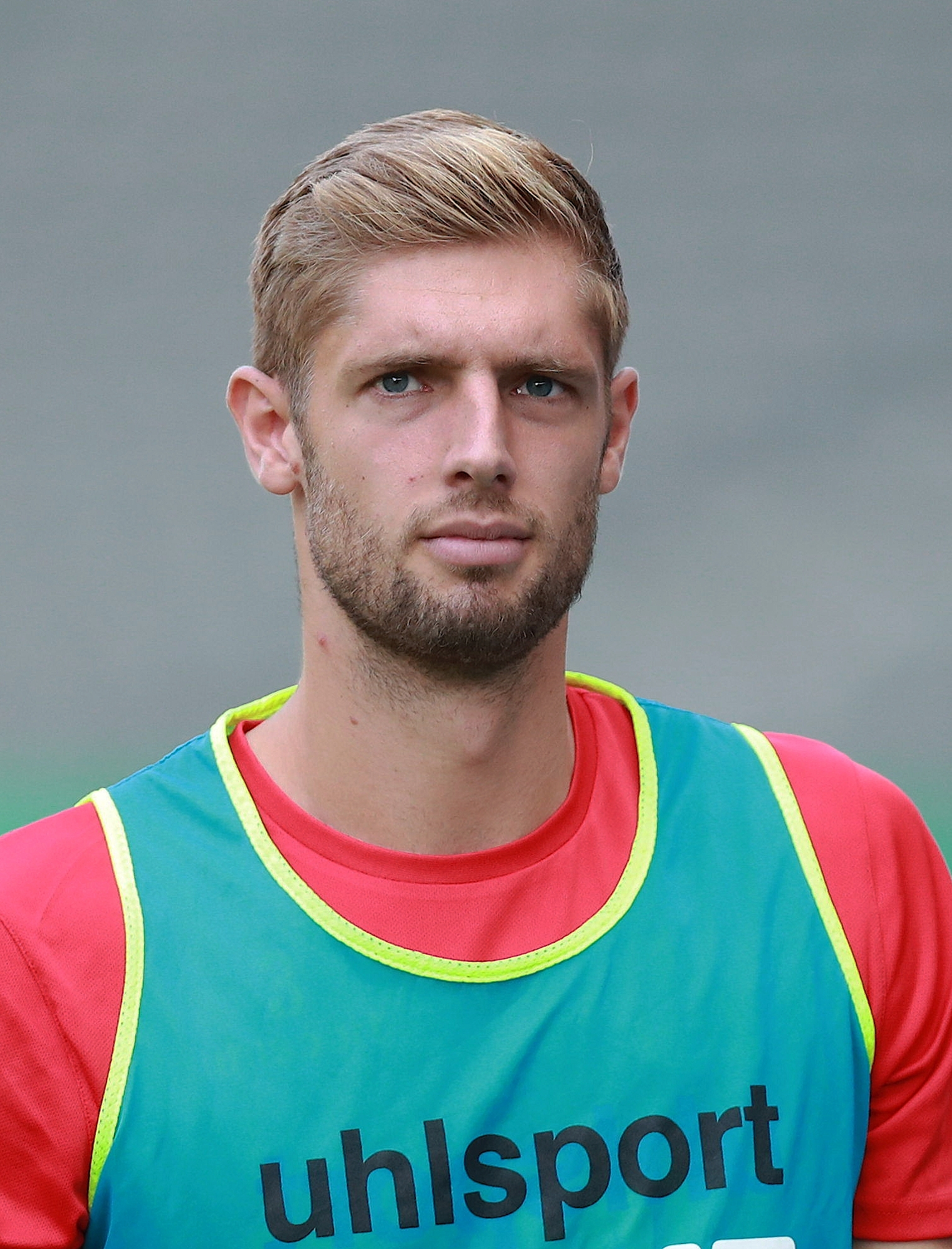 DFB-Pokal 2018/19, 1. Hauptrunde: BFC Dynamo gegen 1. FC Köln 1:9 (1:4)